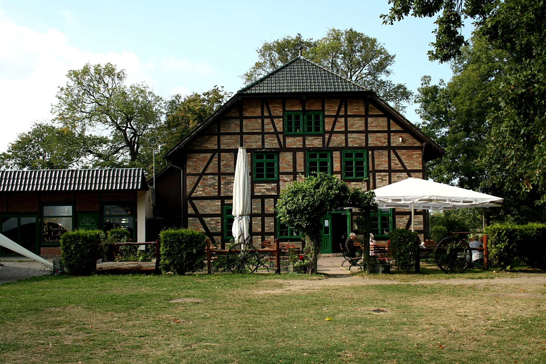 Rostock Schnatermann Gasthof